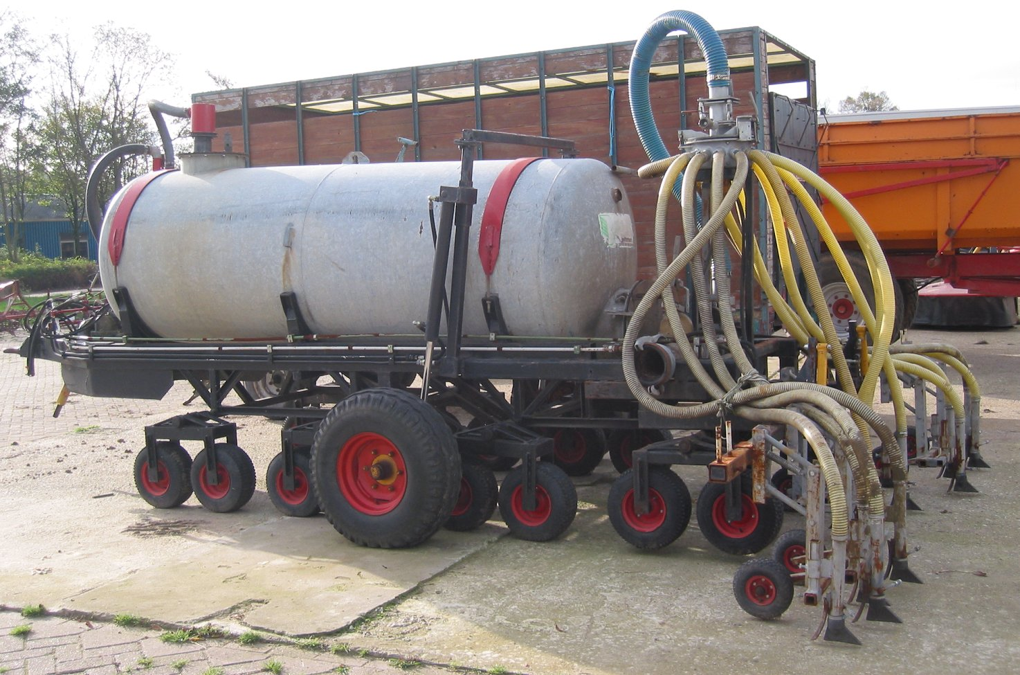 Zodebemester. Sleufkouterbemester. Vacuumpomp voor orgie.